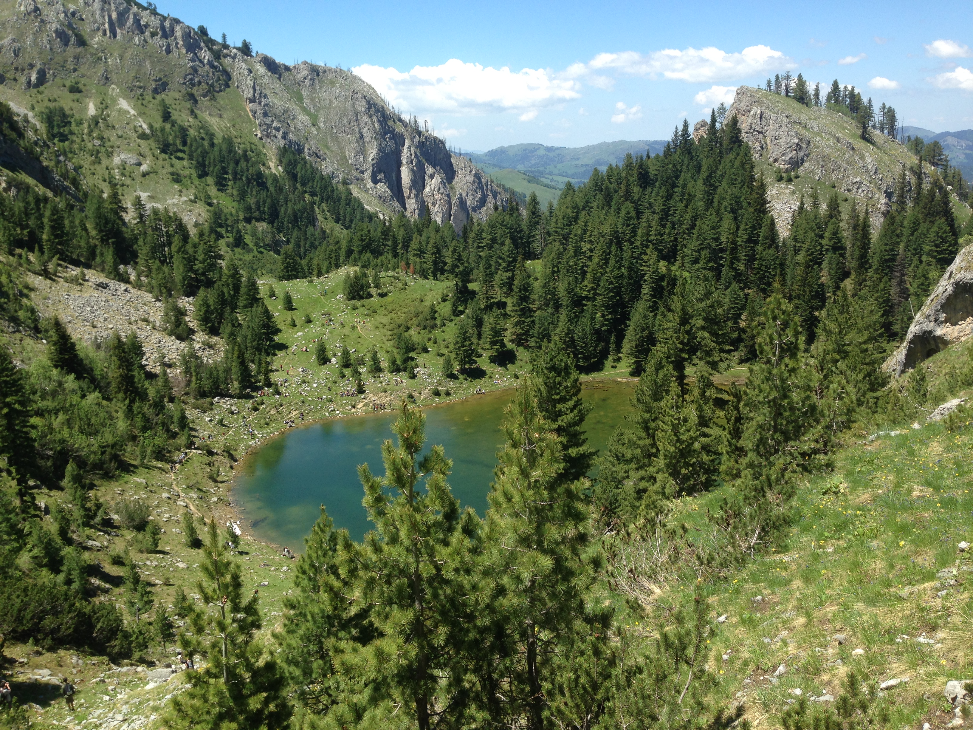 Parku Kombëtar Bjeshkët e Nemuna, Kuqishtë, Pejë.